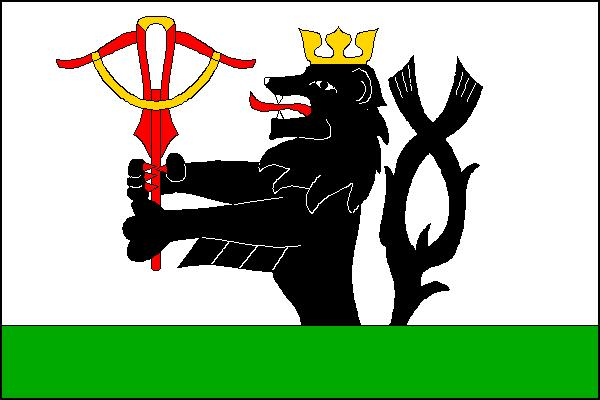 Vlajka obce Lubná